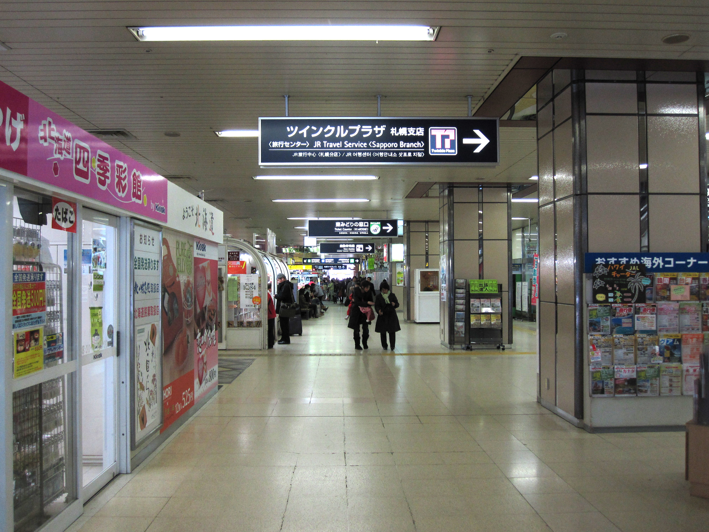 札幌駅東コンコース（JR北海道函館本線）